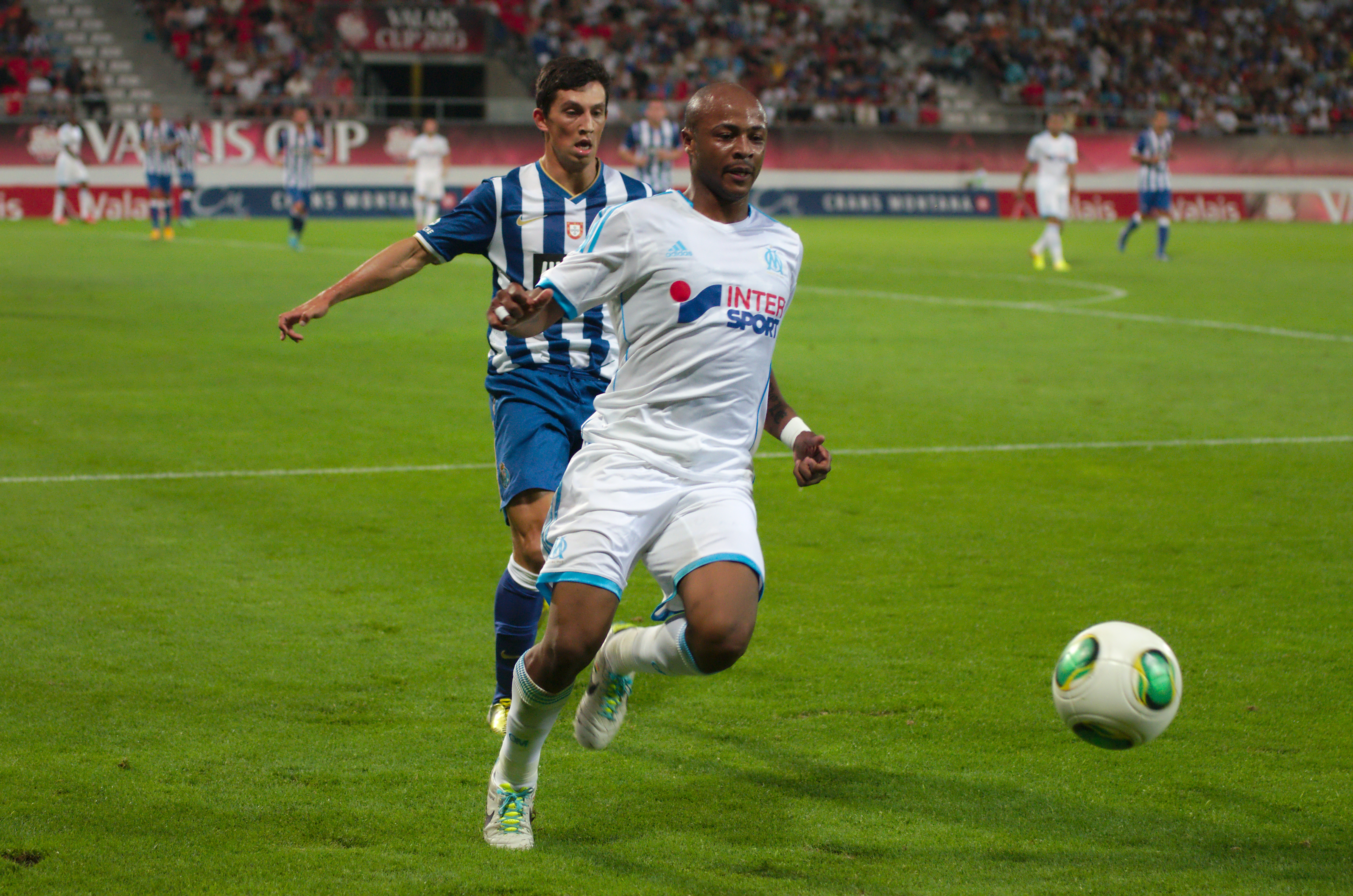 Valais Cup 2013 - OM-FC Porto - 20130713 - André Castro et André Ayew